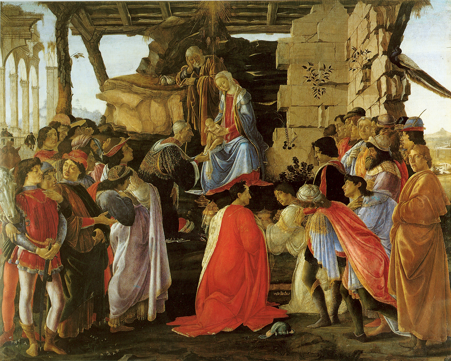 Darstellung der Mitglieder der Medici-Familie als Könige: Cosimo de' Medici (kniend), Piero de' Medici und Giovanni (Rückenfiguren im Mittelpunkt) und Angehörige des Medici-Hofes